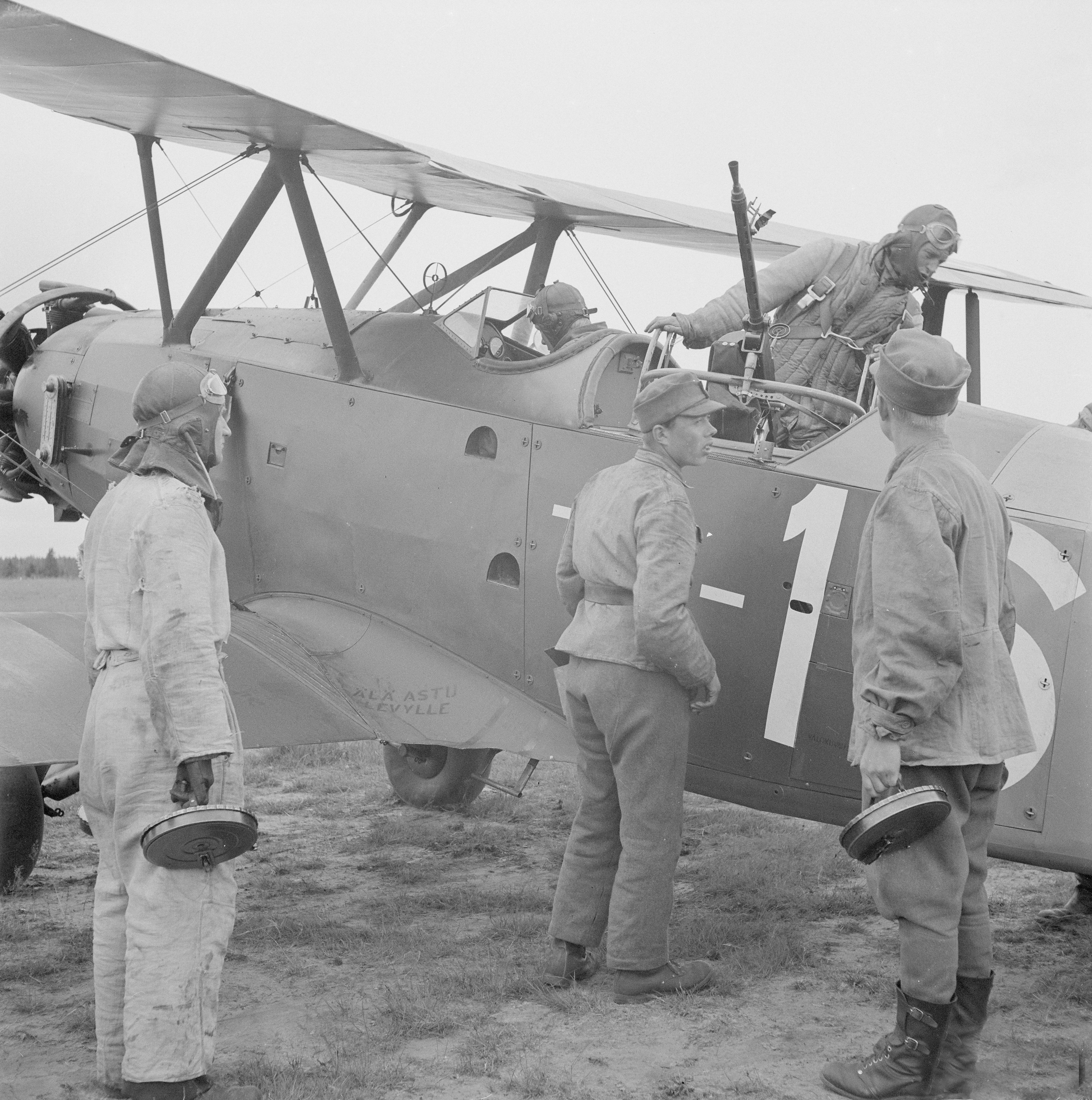 Kun tähystäjäoppilas on suorittanut ilma-ammunnan, lähtee seuraava ampumapaikalle.